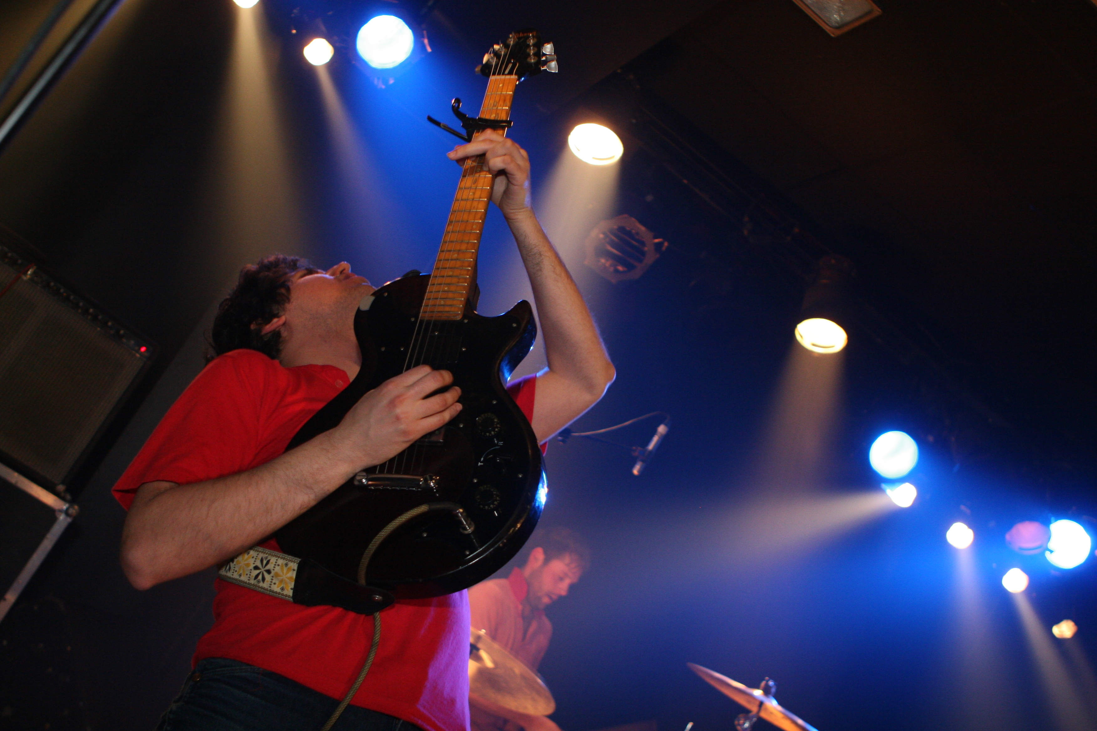 Oxford Collapse en el concierto que ofrecieron en La [2] de Apolo el 11 de Febrero de 2009, podéis leer una crónica del concierto en